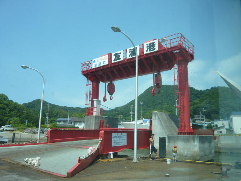 今治市友浦漁港